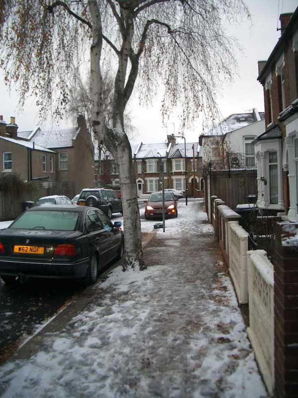 Melville Road, Lower Walthamstow